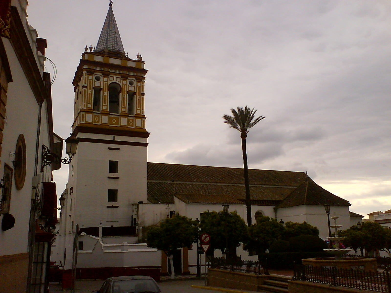 Iglesia de Santa María en Sanlúcar la Mayor, provincia de Sevilla, España.